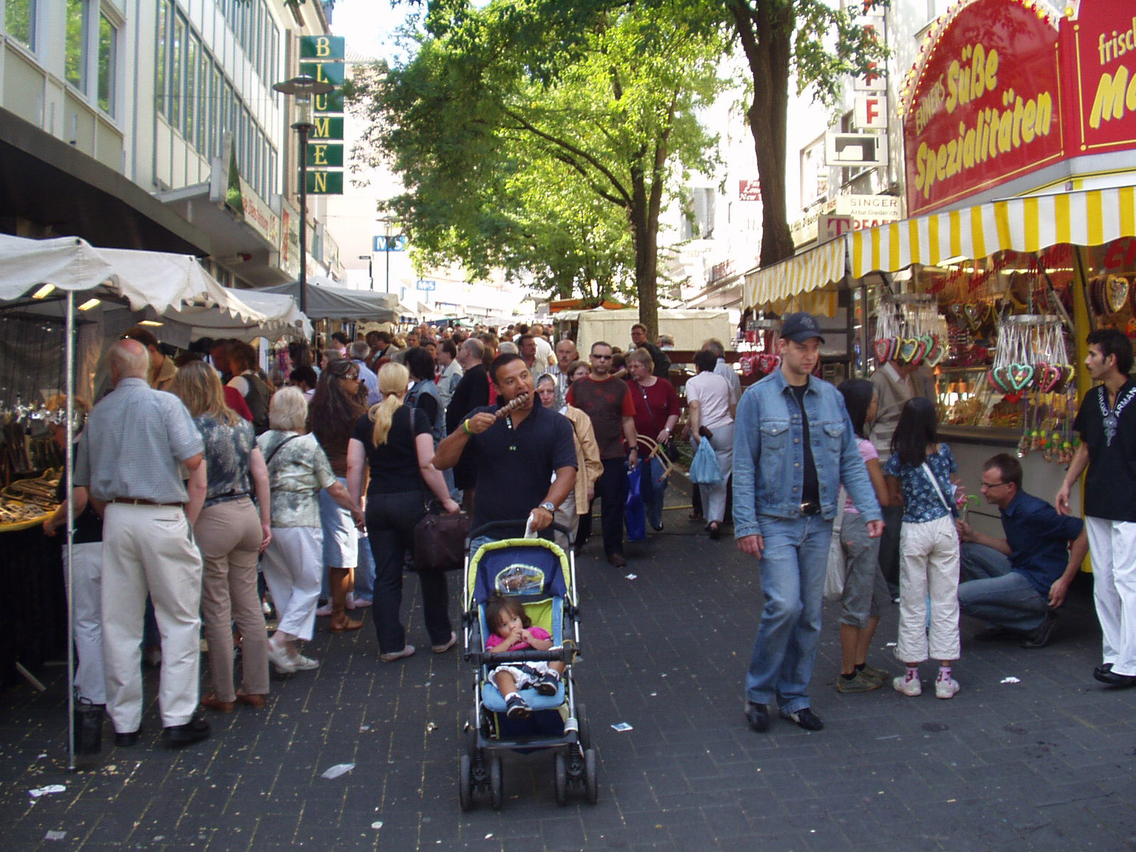 38. Zöppkesmarkt, (Trödelmarkt) in Solingen, Linkgasse